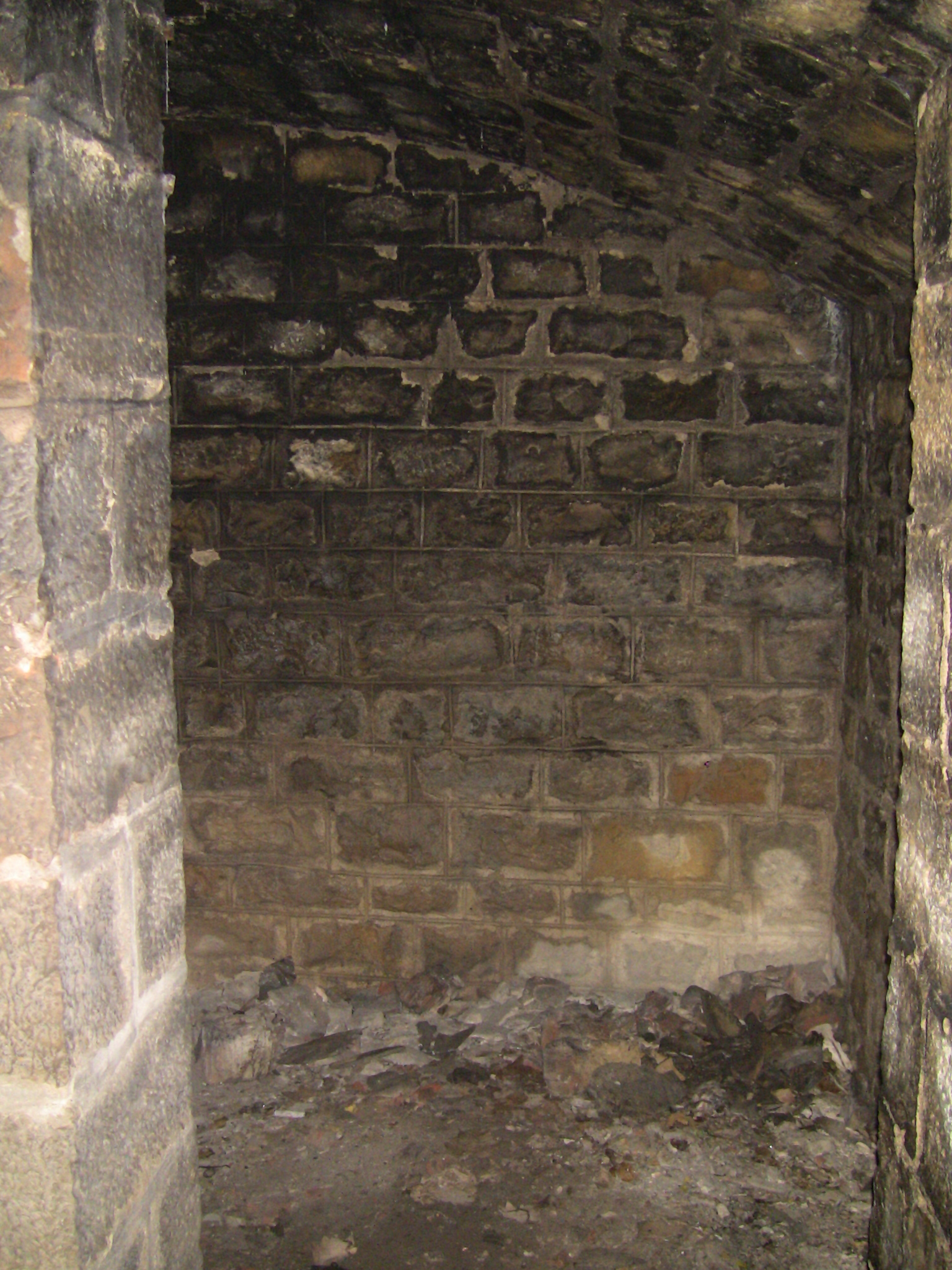 Petit local annexe de la chambre I de la batterie de mortiers du fort de Planoise, à Besançon (Doubs, France).